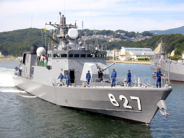 佐世保・崎辺地区の警備隊港湾施設に接岸するミサイル艇くまたか。